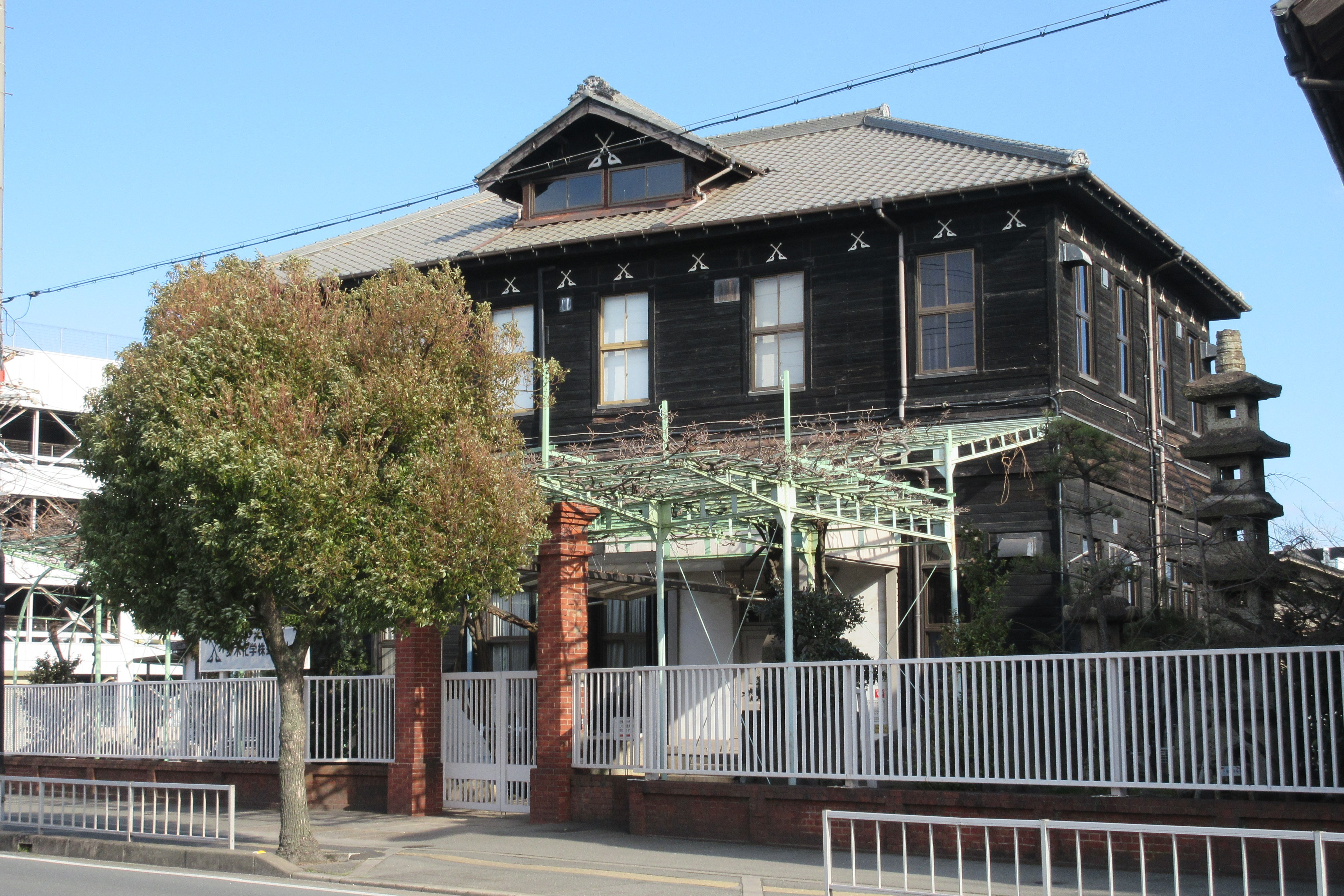 多木化学本社